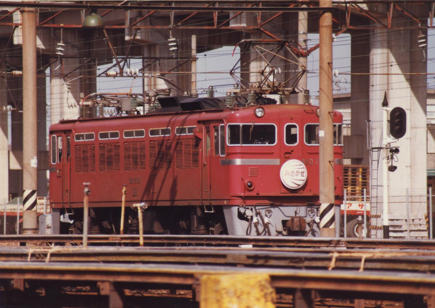 ED75-300番台「あさかぜ」のヘッドマーク付き(竹下客車区で撮影)